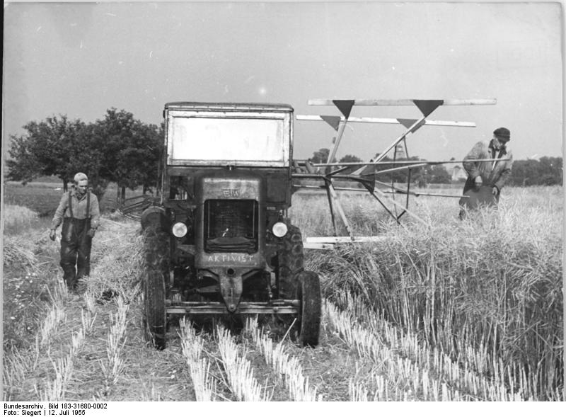 Dörschnitz, Rapsernte mit Mähbinder Zentralbild Siegert 3 Motive 12.7.1955 Die Ölfruchternte hat begonnen In den letzten Tagen hat in einigen Kreisen unserer Republik die Mahd der Ölfrüchte begonnen. UBz: Kollegen der MTS Neckanitz mit dem Mähbinder auf einem Rapsfeld der LPG Dörschmitz, Kr. Meißen. Sofort nach der Mahd des Rapses wird die Schälfurche gezogen und dann Rosenkohl gepflanzt.